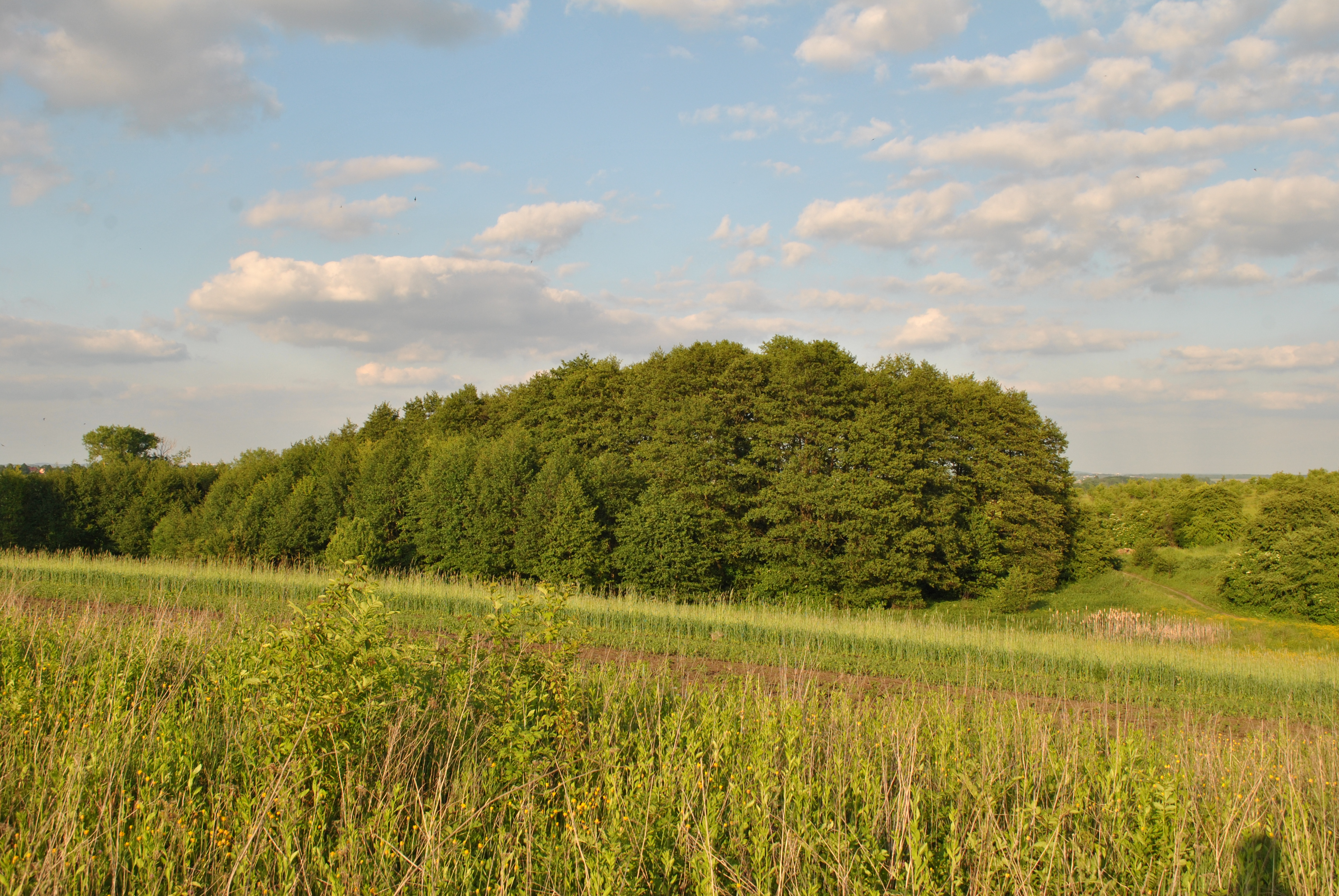 Ландшафтний заказник місцевого значення «Наші гаї» — лісові масиви в межах населеного пункту с. Великі Гаї Тернопільського району Тернопільської області.